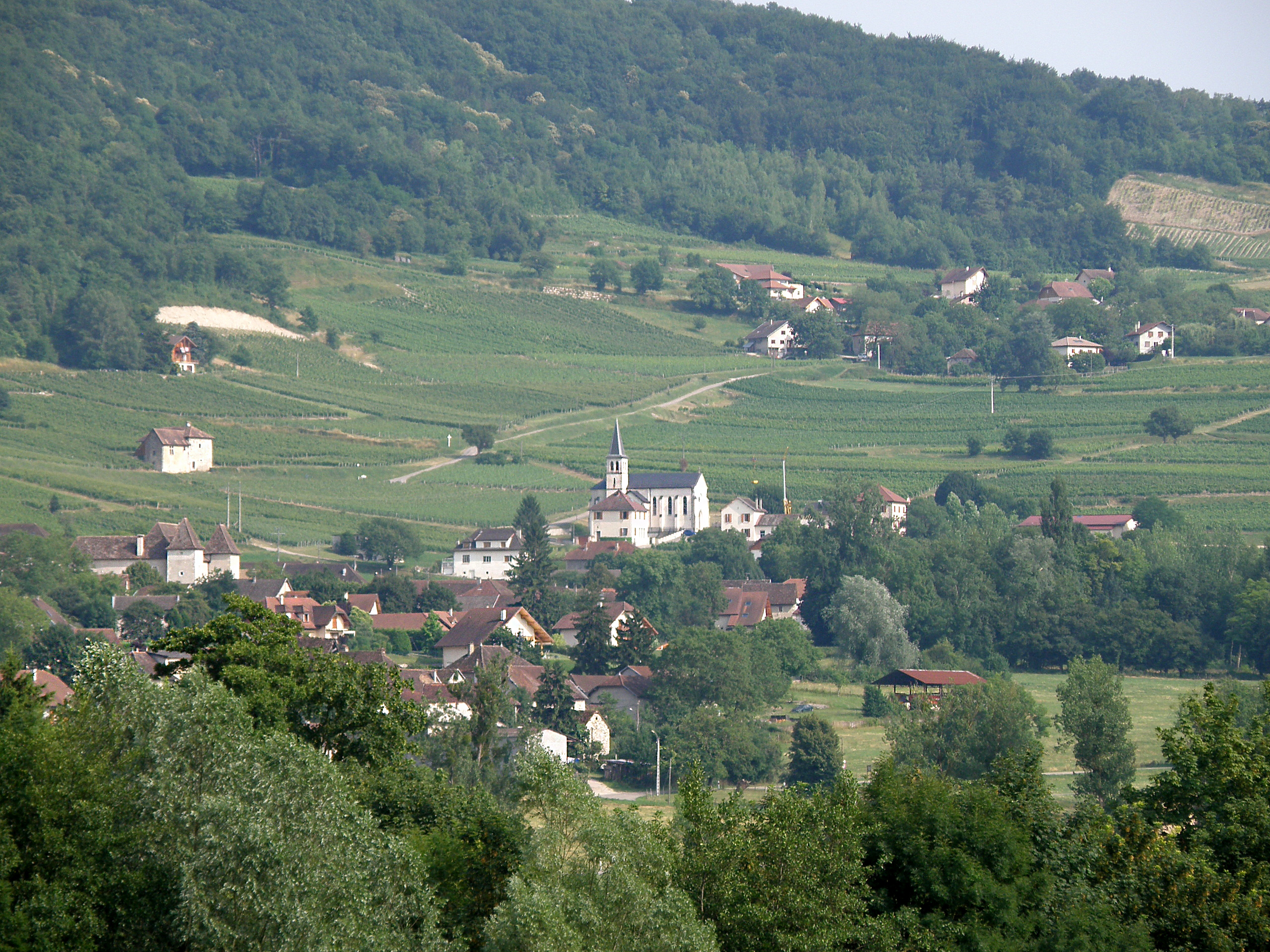 Jongieux, comm. du département de la Savoie (région Rhônes-Alpes, France). Vue prise depuis le pont de Lucey sur le Rhône. Nous regardons vers le sud-sud-ouest.